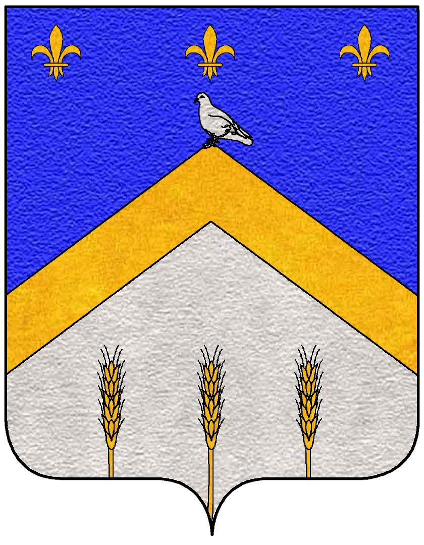 Stemma della famiglia Belgrano